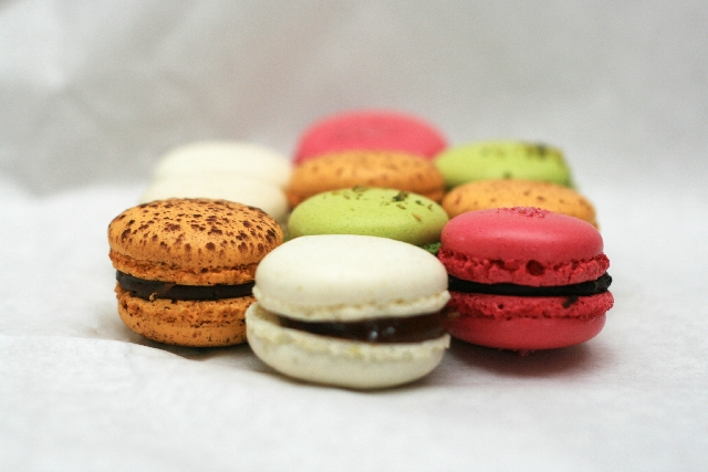 Macaron, Hungary.